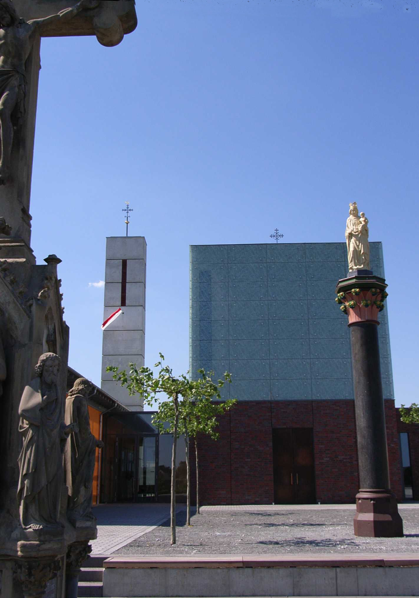 neue kath. Pfarrkirche St. Simon und Judas Thaddäus, Otzenrath (neu)